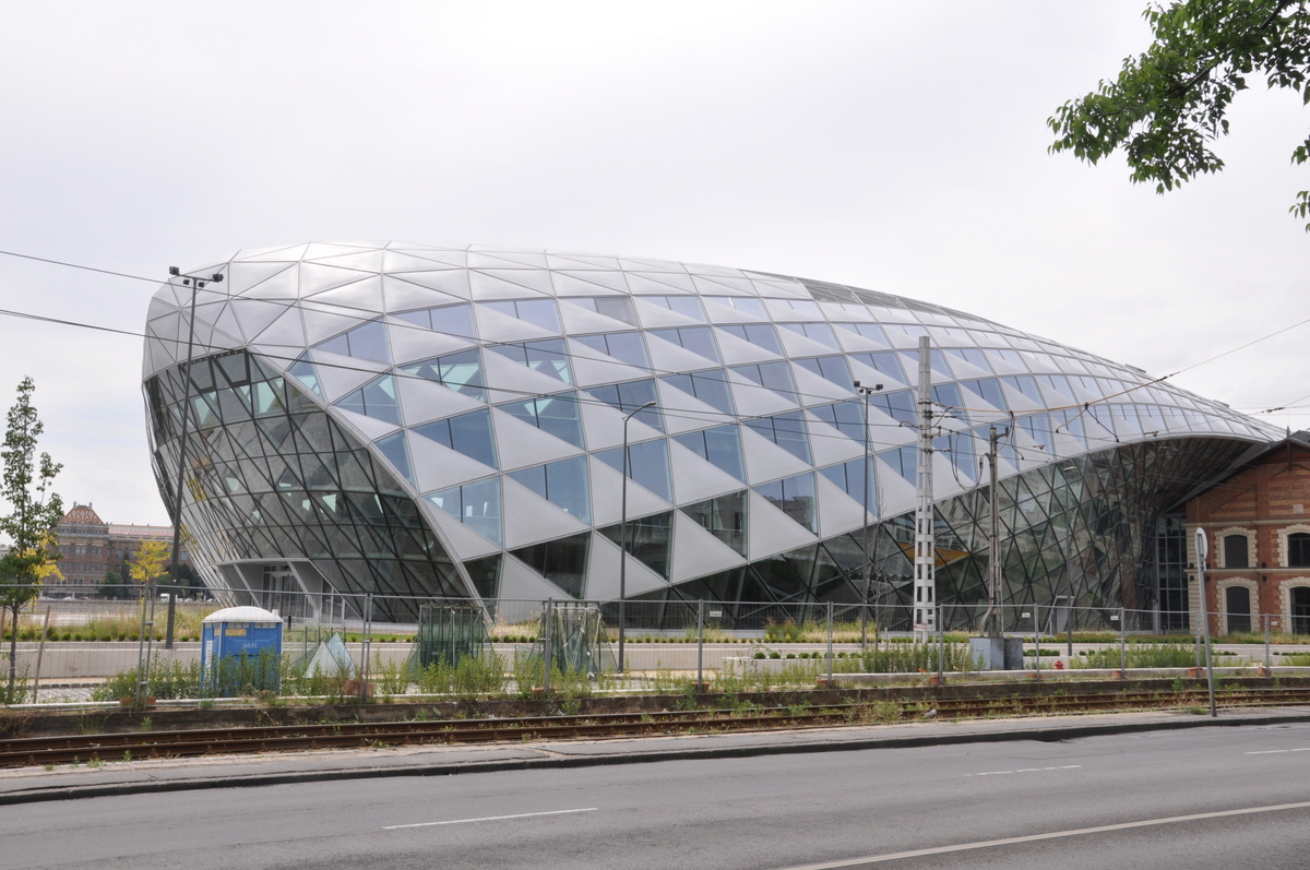 CET-Budapest